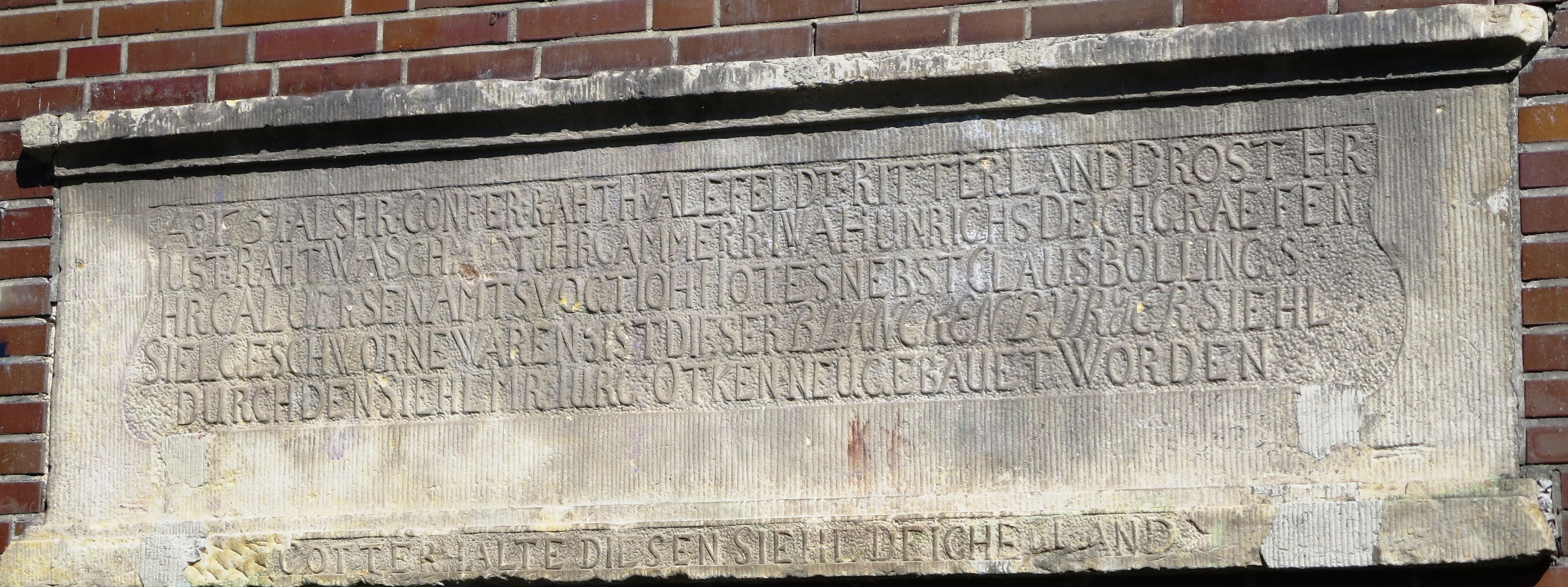 Sandsteinrelief vom alten Blankenburger Siel